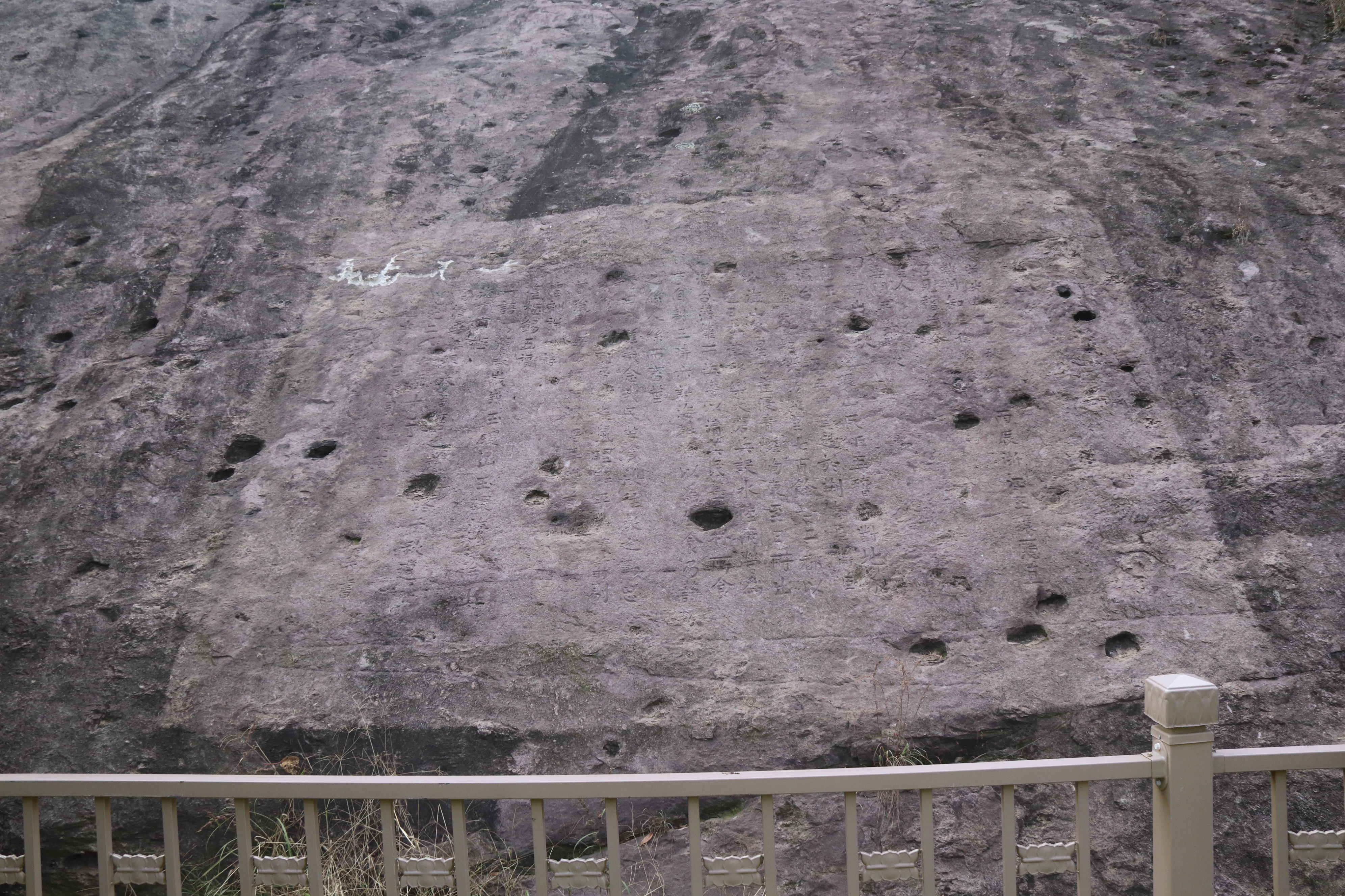 中文（中国大陆）: 玉环市芦浦镇的纪恩诗摩崖题记